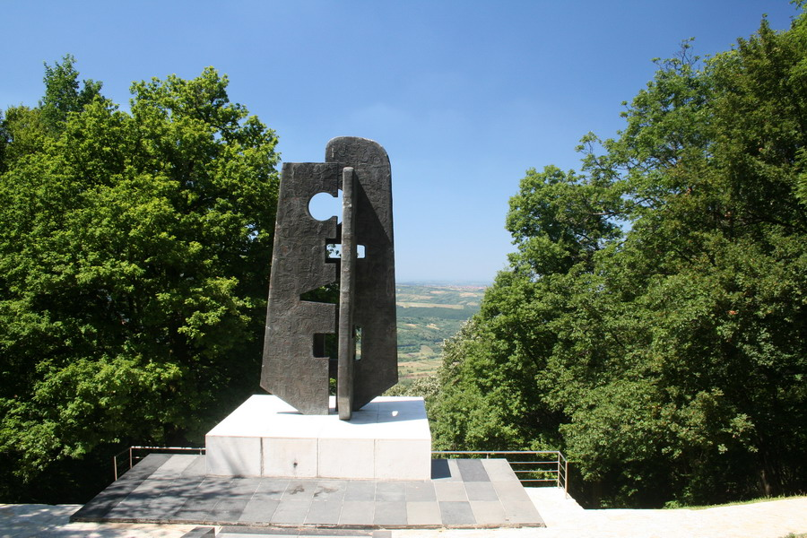 Avala.